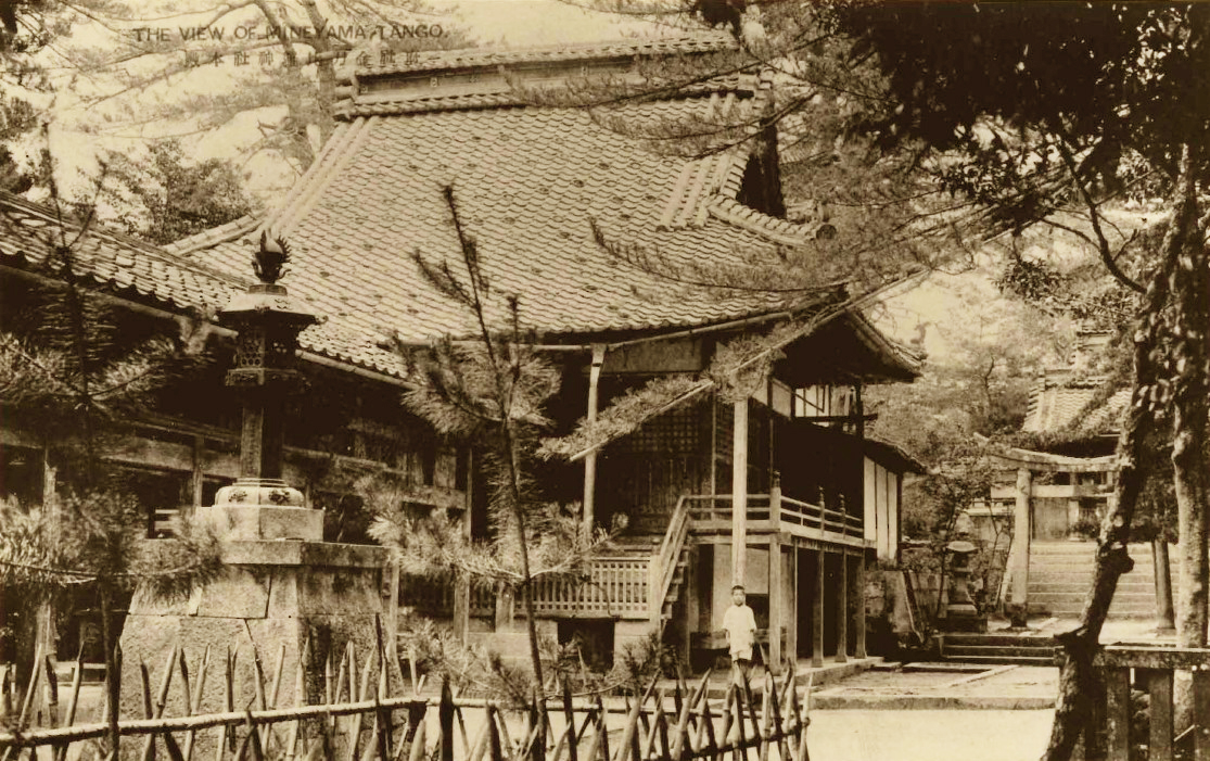 拝殿前には回廊があった。